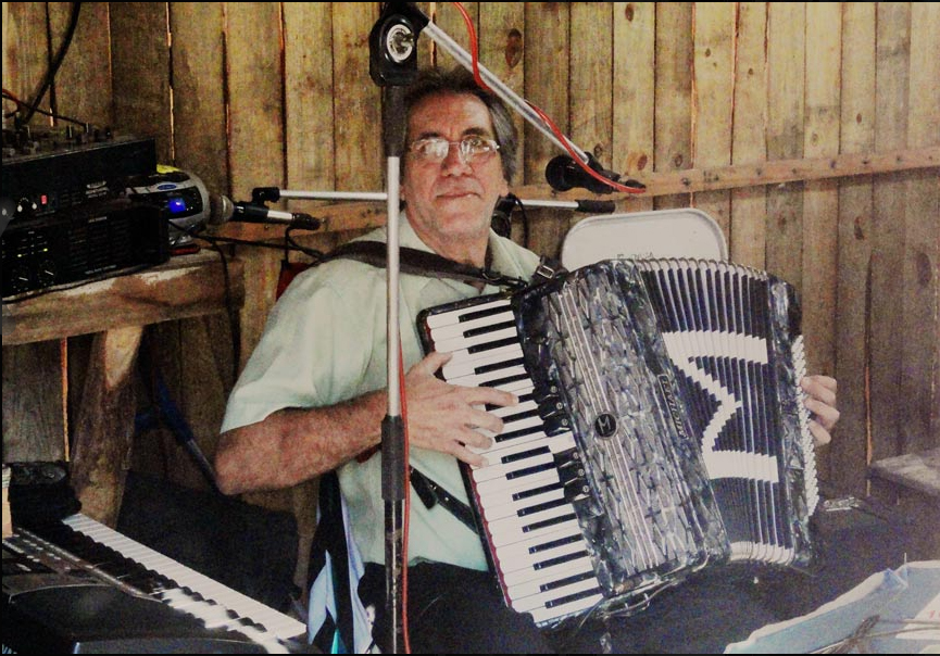 Semana Farroupilha em Porto Alegre